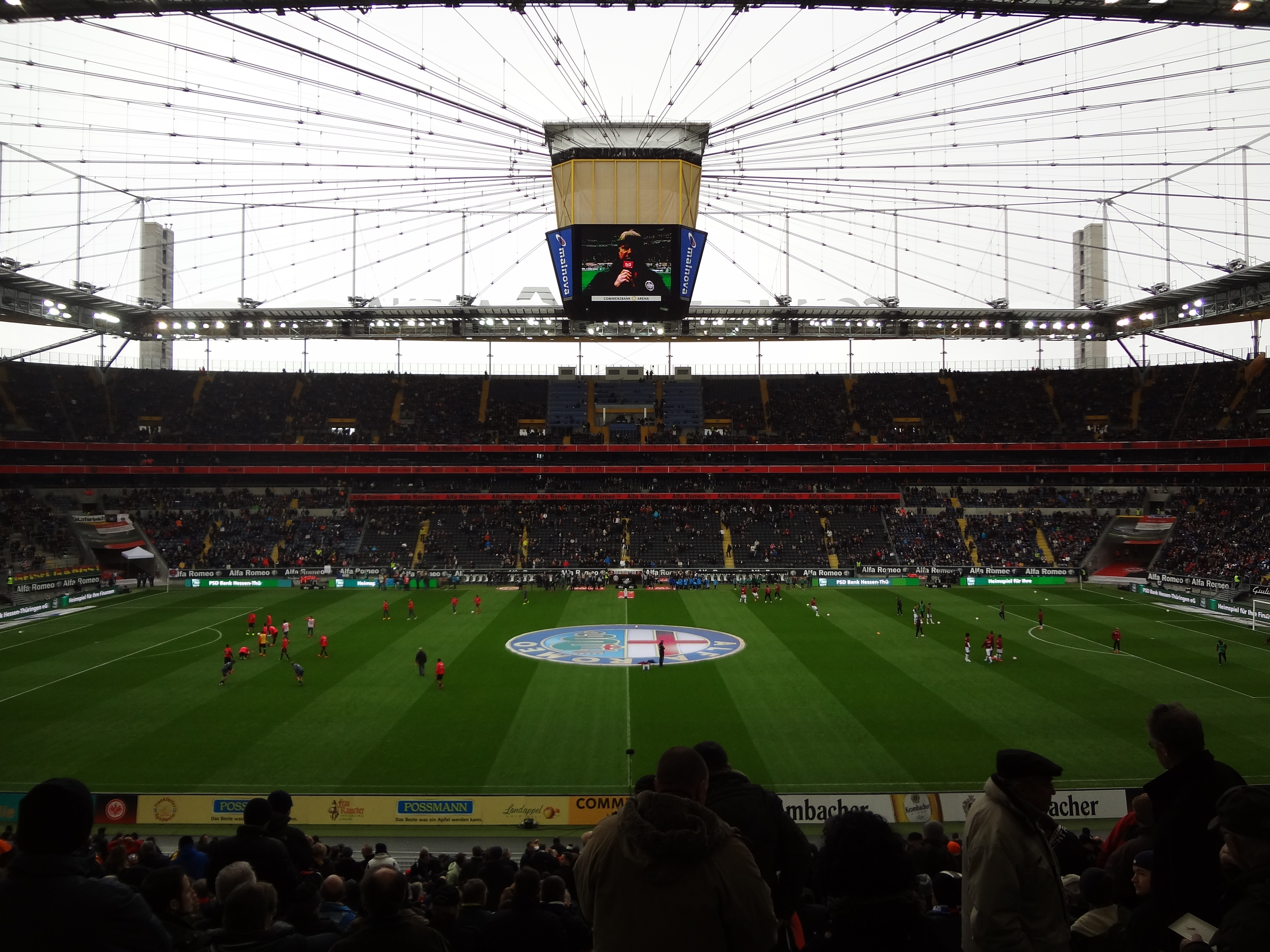 Commerzbank-Arena (Haupttribüne)